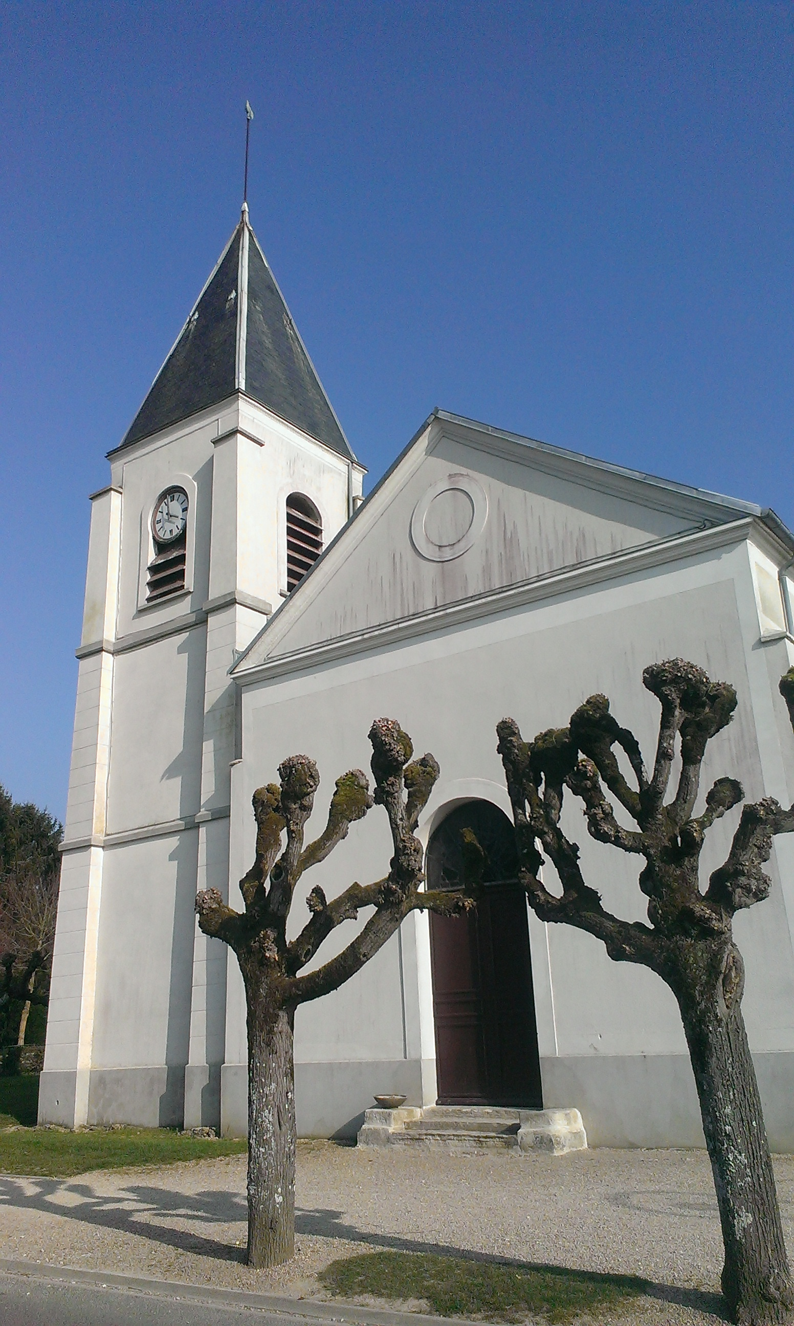 Eglise de Voulangis (77)